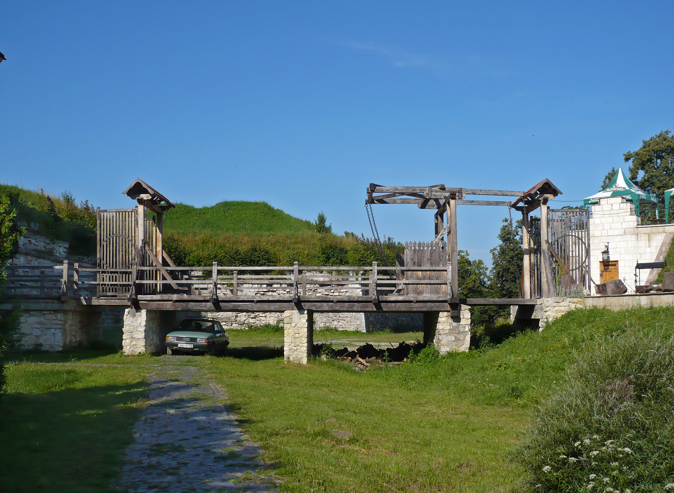 Most do zamku w Złoczowie